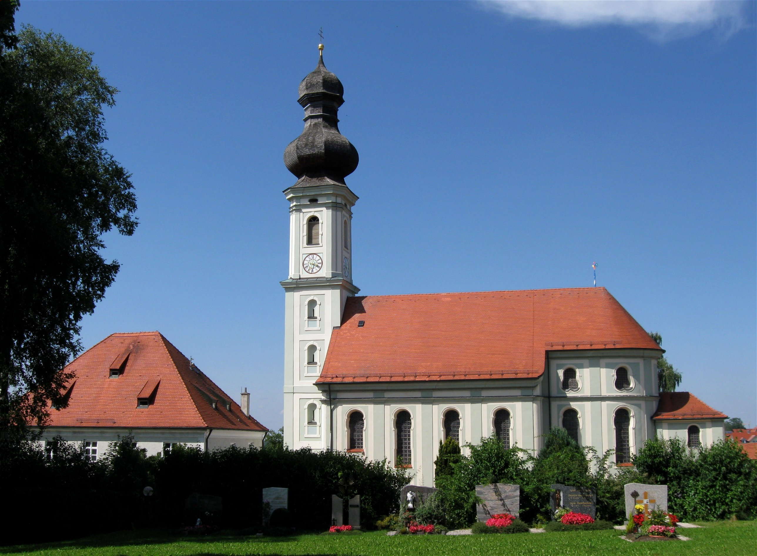 Kath. Pfarrkirche St. Petrus, bedeutender Barockbau von Joh. Bapt. Lethner, 1738/40; mit Ausstattung. Wörth, Landkreis Erding